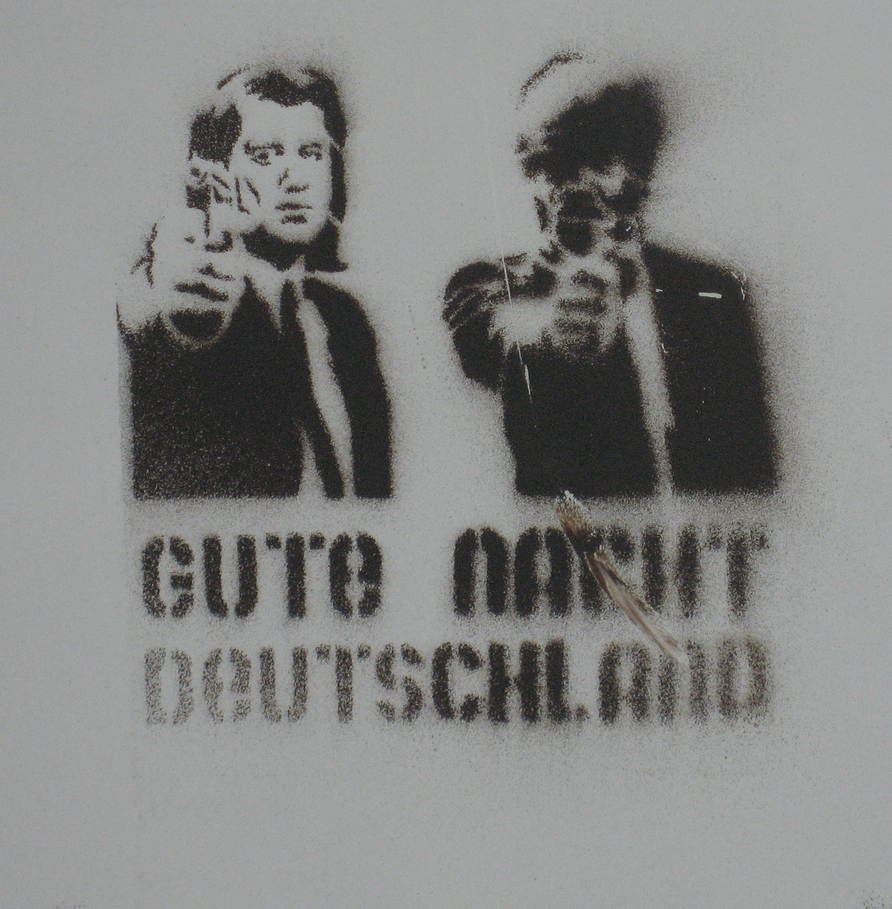 Dortmund, Graffiti